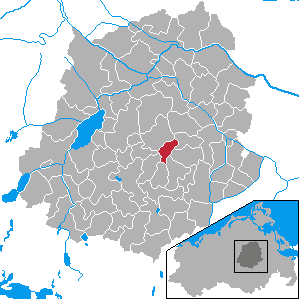 Altenhagen, Landkreis Demmin, Mecklenburg-Vorpommern